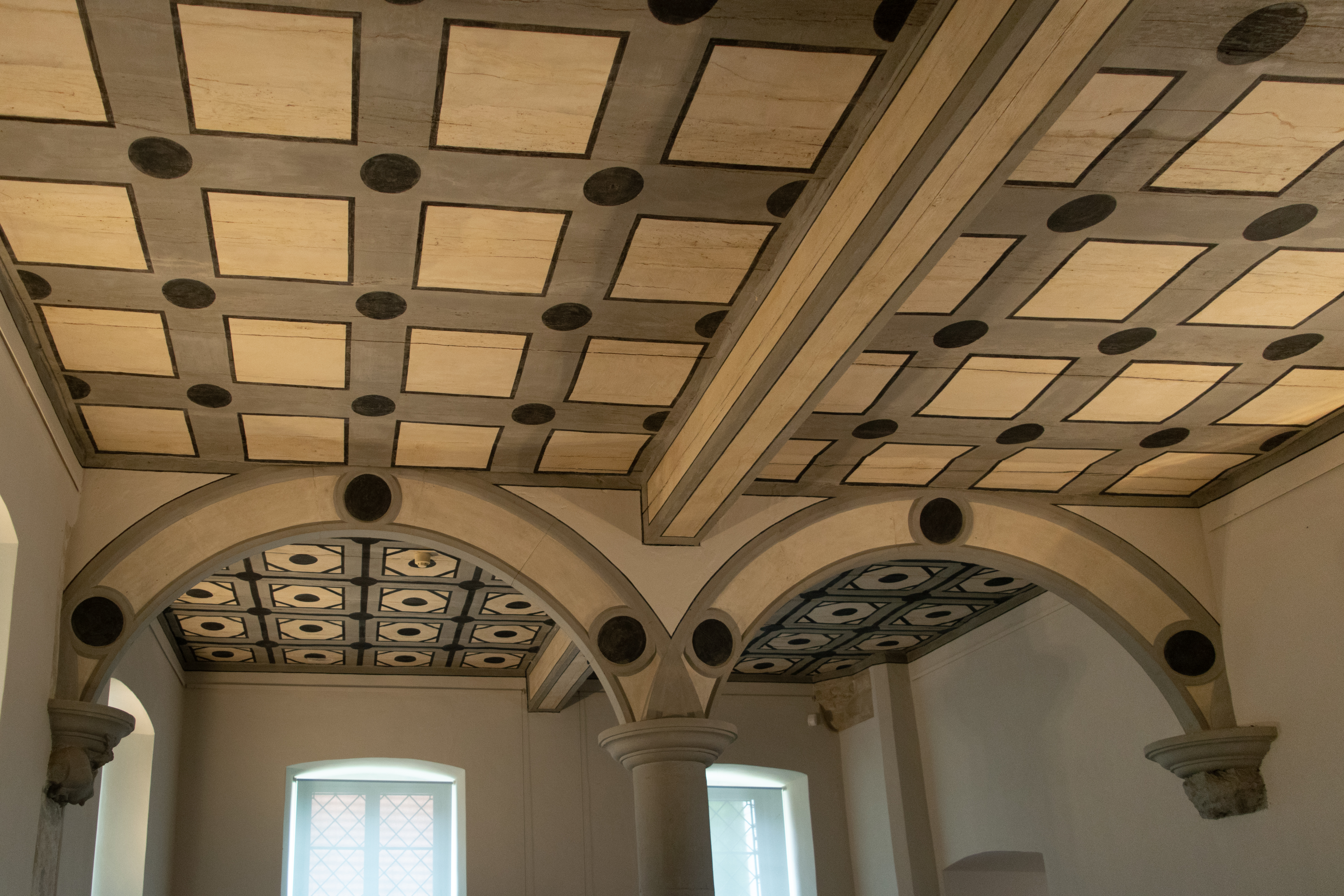 Glam on Tour Jagdschloss Grunewald, Berlin